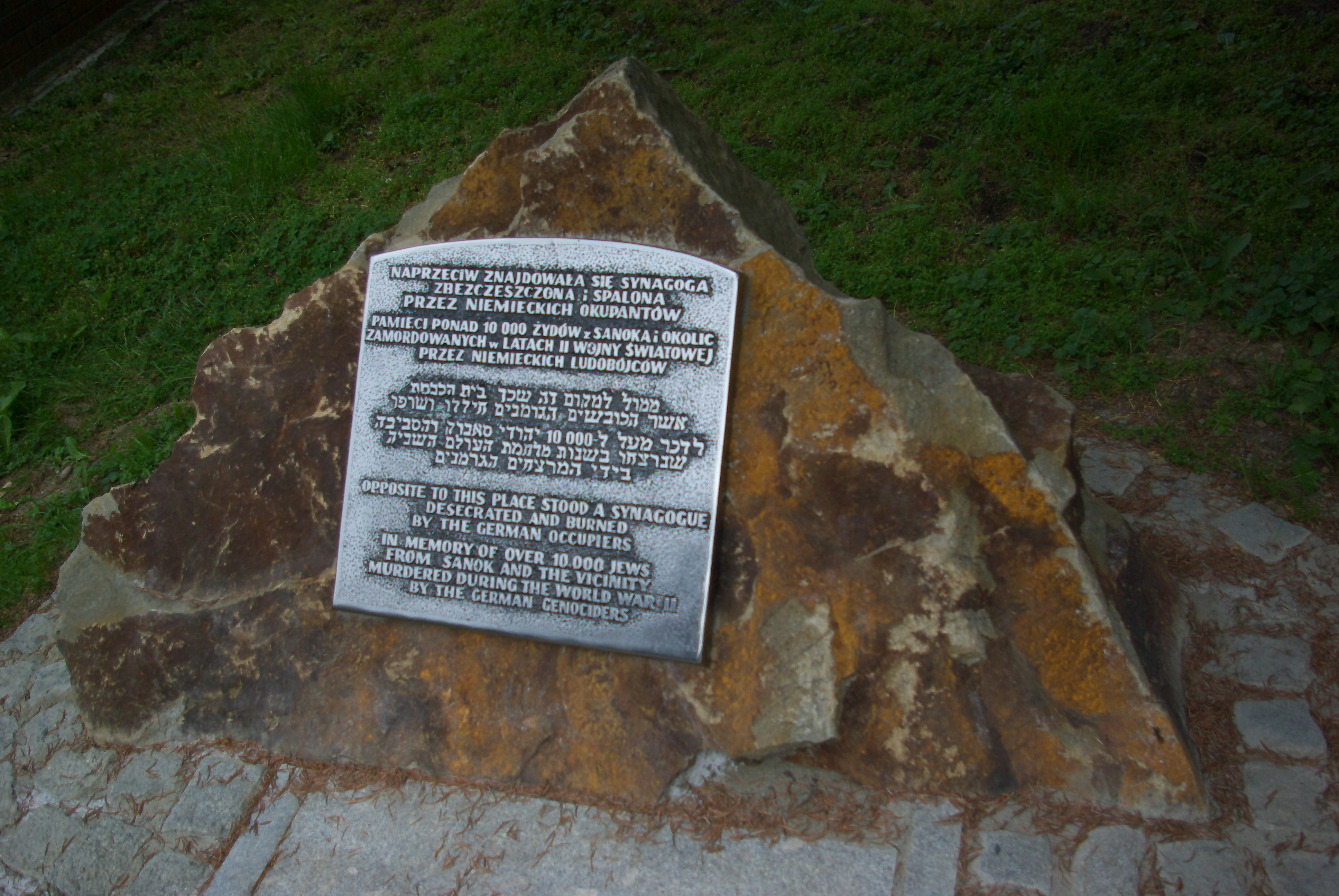 Kamień pamiątkowy upamiętniający Wielką Synagogę w Sanoku przy ulicy Zamkowej